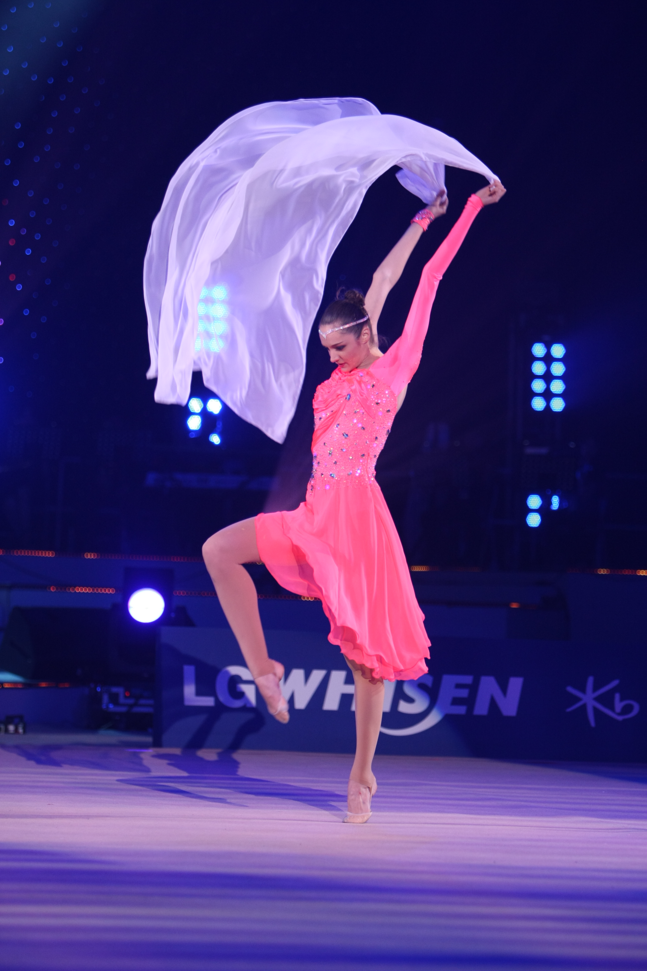 LG전자가 11일(土, 오후 3시), 12일(日, 오후 2시) 양일간 고려대학교 화정체육관 특설무대에서 국내 최초 리듬체조 갈라쇼인 ‘LG WHISEN Rhythmic All Stars 2011’ 행사를 개최했다. 사진은 11일 고려대학교 화정체육관 특설무대에서 열린 ‘LG WHISEN Rhythmic All Stars 2011’ 행사에서 LG ‘휘센’ 광고모델인 손연재(18세, 세종고) 선수를 비롯해 국내외 전•현역 리듬체조 스타들이 총출동해 멋진 리듬체조를 보여줬다.